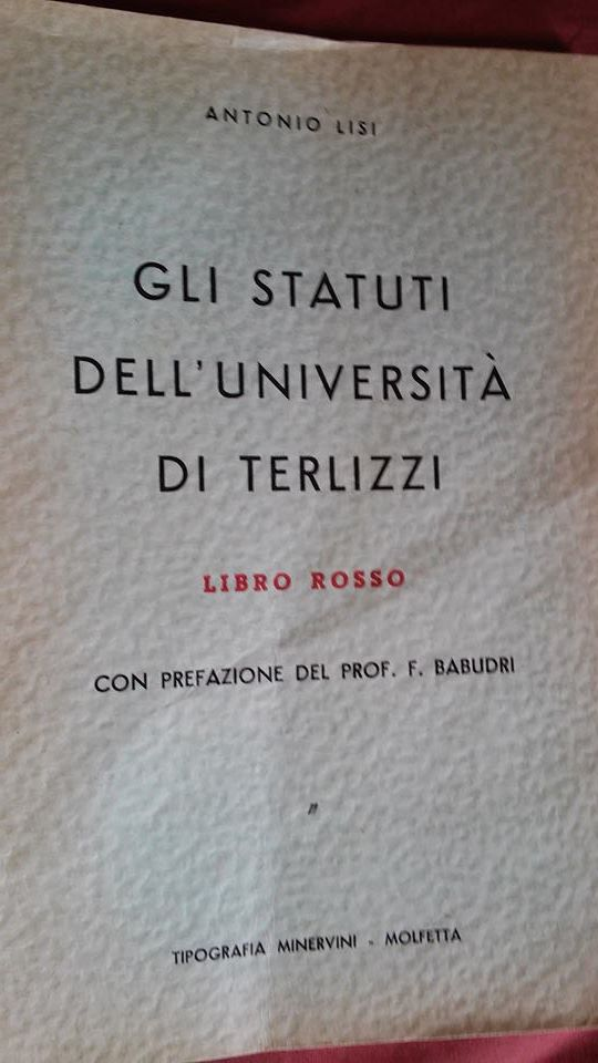 Elenco degli Statuti comunali approvati a Terlizzi durante il 1700